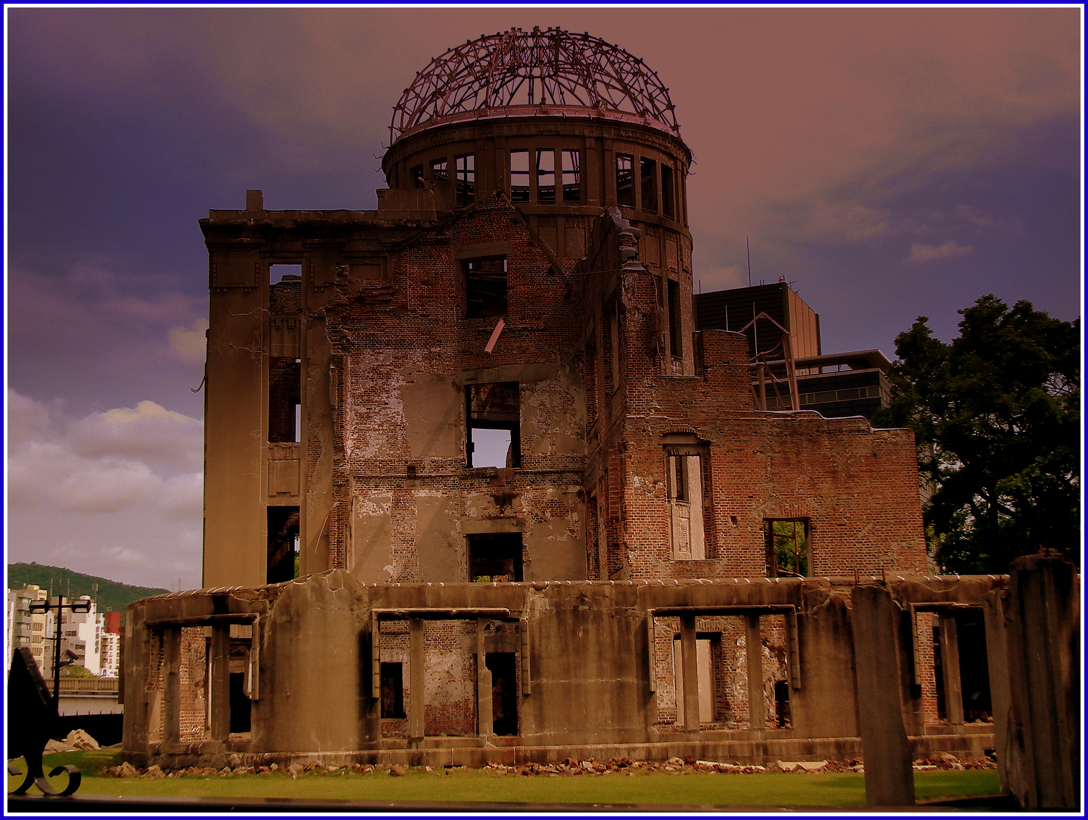 ATOMIC BOMB DOME HIROSHIMA JAPAN JUNE 2012